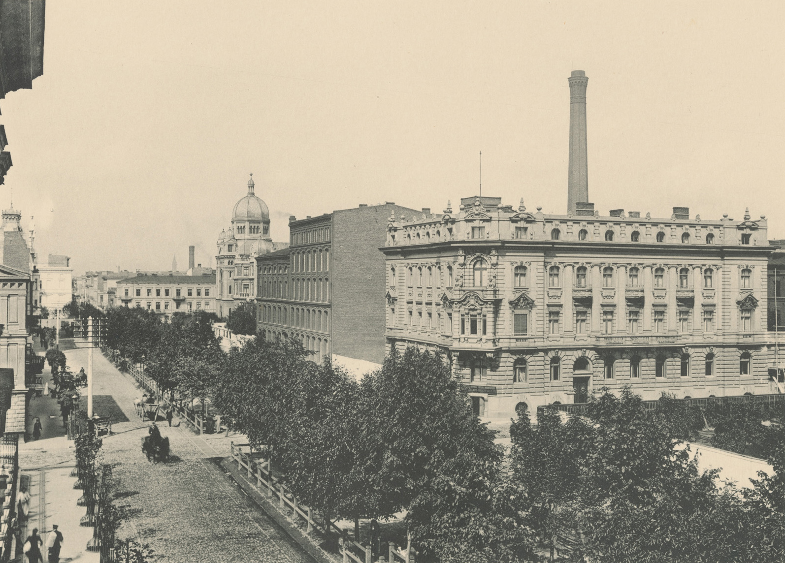 Fotografia przedstawia widok na ulicę Spacerową, zwaną także Promenadą lub ulicą Promenadową. Ulica ta miała stanowić przeciwwagę dla zatłoczonej, ruchliwej ulicy Piotrkowskiej. Spacerowa została założona jako deptak. Środek alei był wysadzany drzewami: kasztanowcami, topolami, akacjami, pomiędzy którymi stały ławeczki. Na przełomie XIX i XX wieku zaczęły powstawać przy niej wspaniałe rezydencje i kamienice, jak widoczna na fotografii kamienica Karola Kretschmera zbudowana w 1896 roku. W oddali na drugim planie widać Synagogę postępową wybudowaną w latach 80. XIX wieku według projektu Adolfa Wolffa. W 1917 roku w stulecie śmierci Tadeusza Kościuszki aleja otrzymała jego imię. W 1935 roku ułożono nawierzchnię z klinkieru. W latach 50. XX wieku deptak został zlikwidowany, a na środku ulicy położono szyny tramwajowe. Fotografia pochodzi z wydanego w 1896 roku albumu Bronisława Wilkoszewskiego „Widoki m. Łodzi”. Saryusz Bronisław Paweł Wilkoszewski (1847-1901), zwany "łódzkim Canaletto" był mistrzem fotografii ilustracyjnej. Udokumentował zabudowę Łodzi z końca XIX wieku przede wszystkim wille, fabryki, budynki użyteczności publicznej, obiekty sakralne, ulicę Piotrkowską. Jego zakład fotograficzny znajdował się w willi "Trianon" w Pasażu Meyera 5 (obecnie ulica Moniuszki).